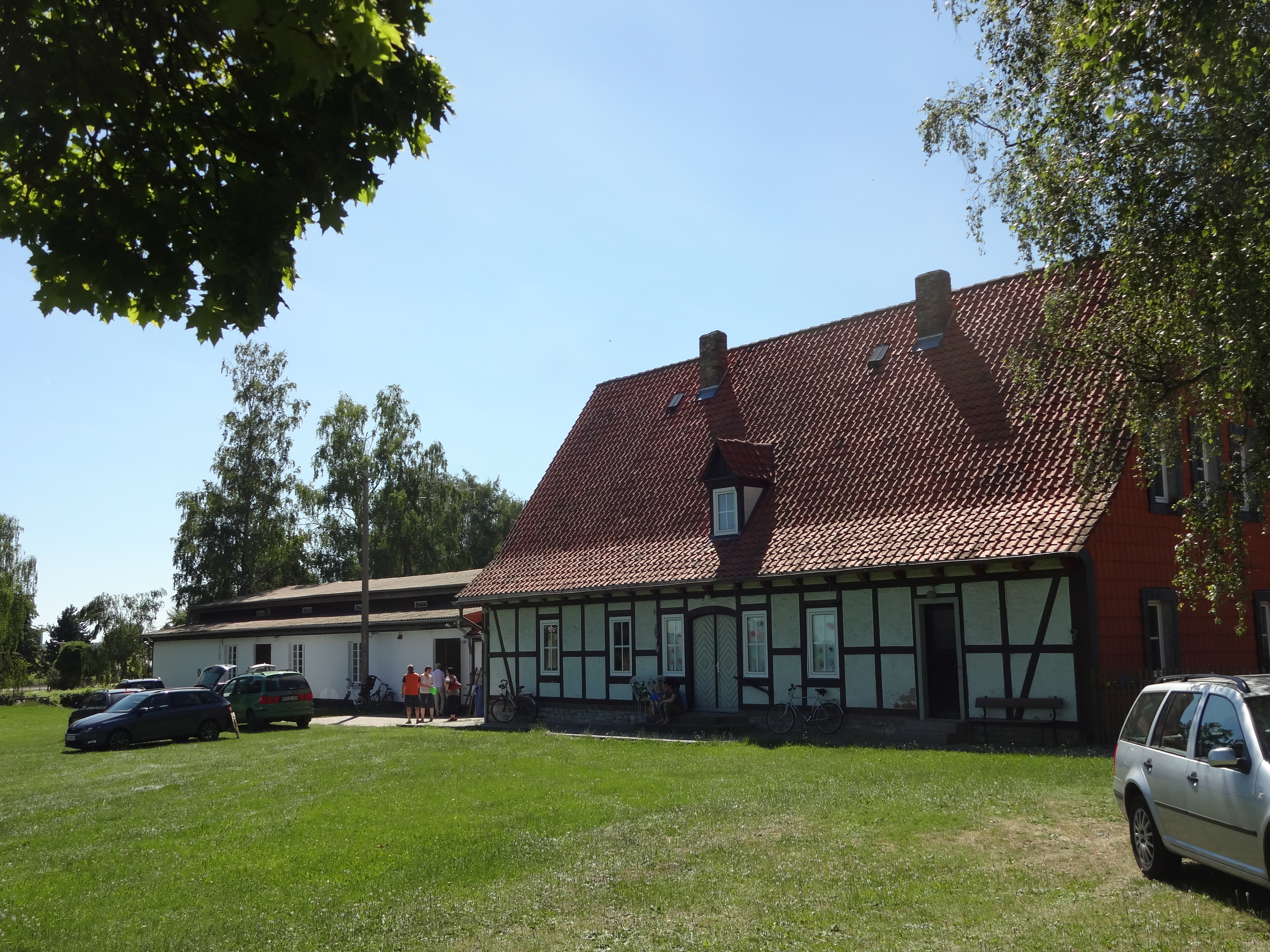 denkmalgeschütztes Vereinshaus in der Heerstraße 9 in Langeln, in der Gemeinde Nordharz